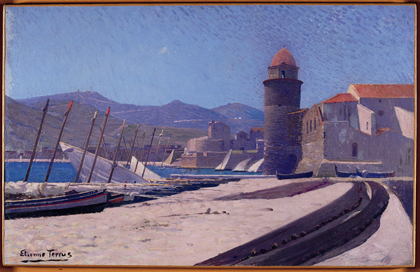 Attribué à Étienne Terrus, Le Port de Collioure, localisation inconnue.